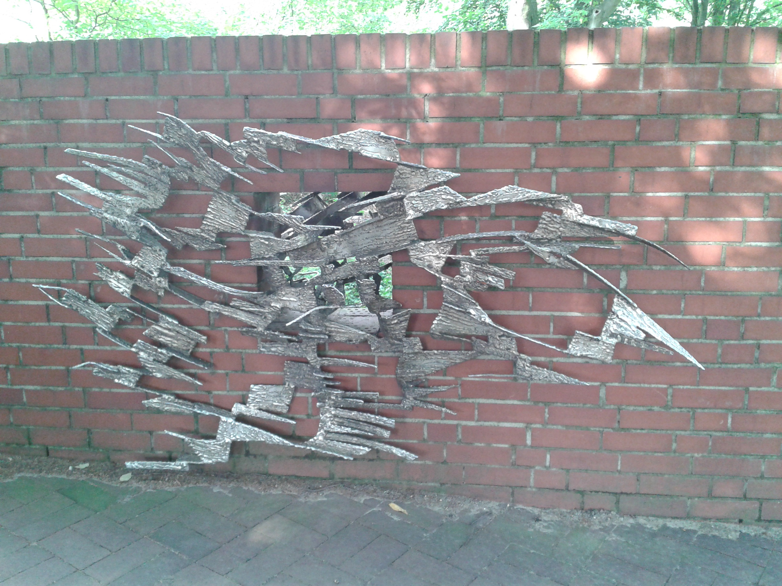 Friedrich Werthmann 1961 .. made for IGA 1963